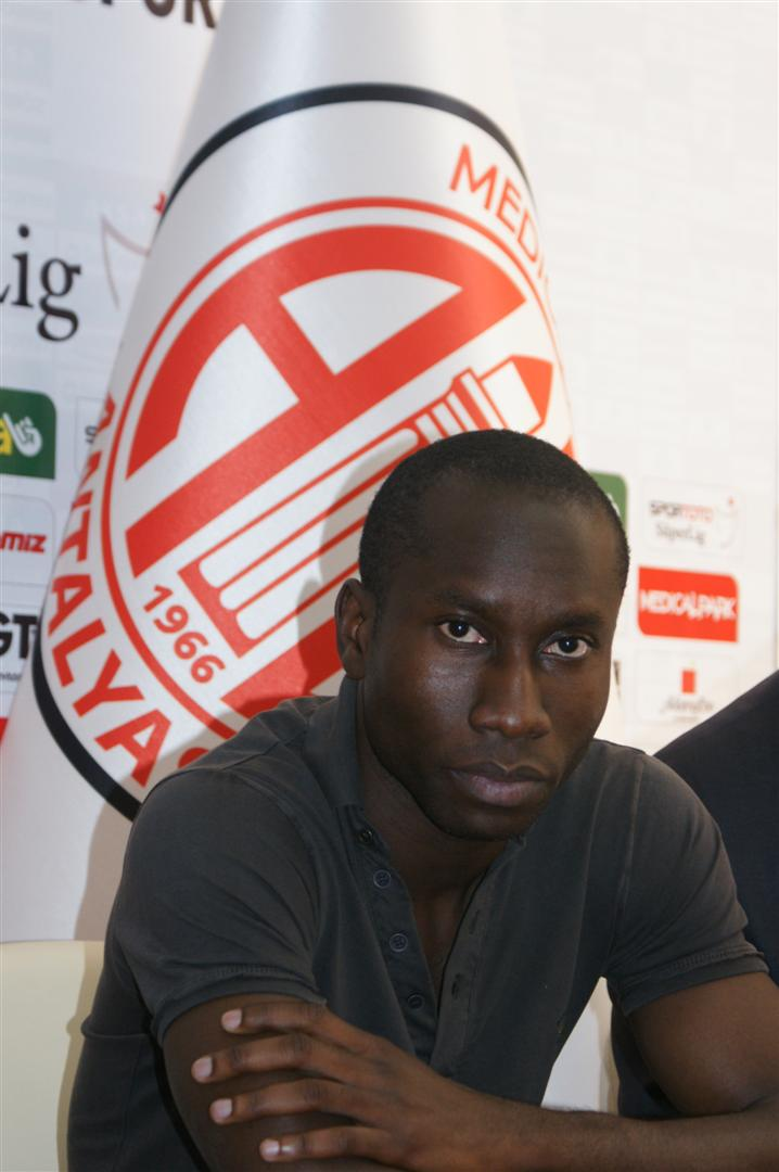 Diarra imza töreninde Fotoğraf : Murat Özgen